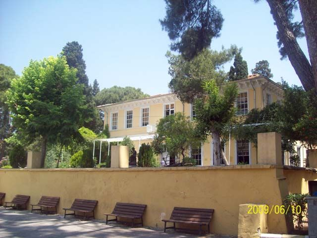 okul.